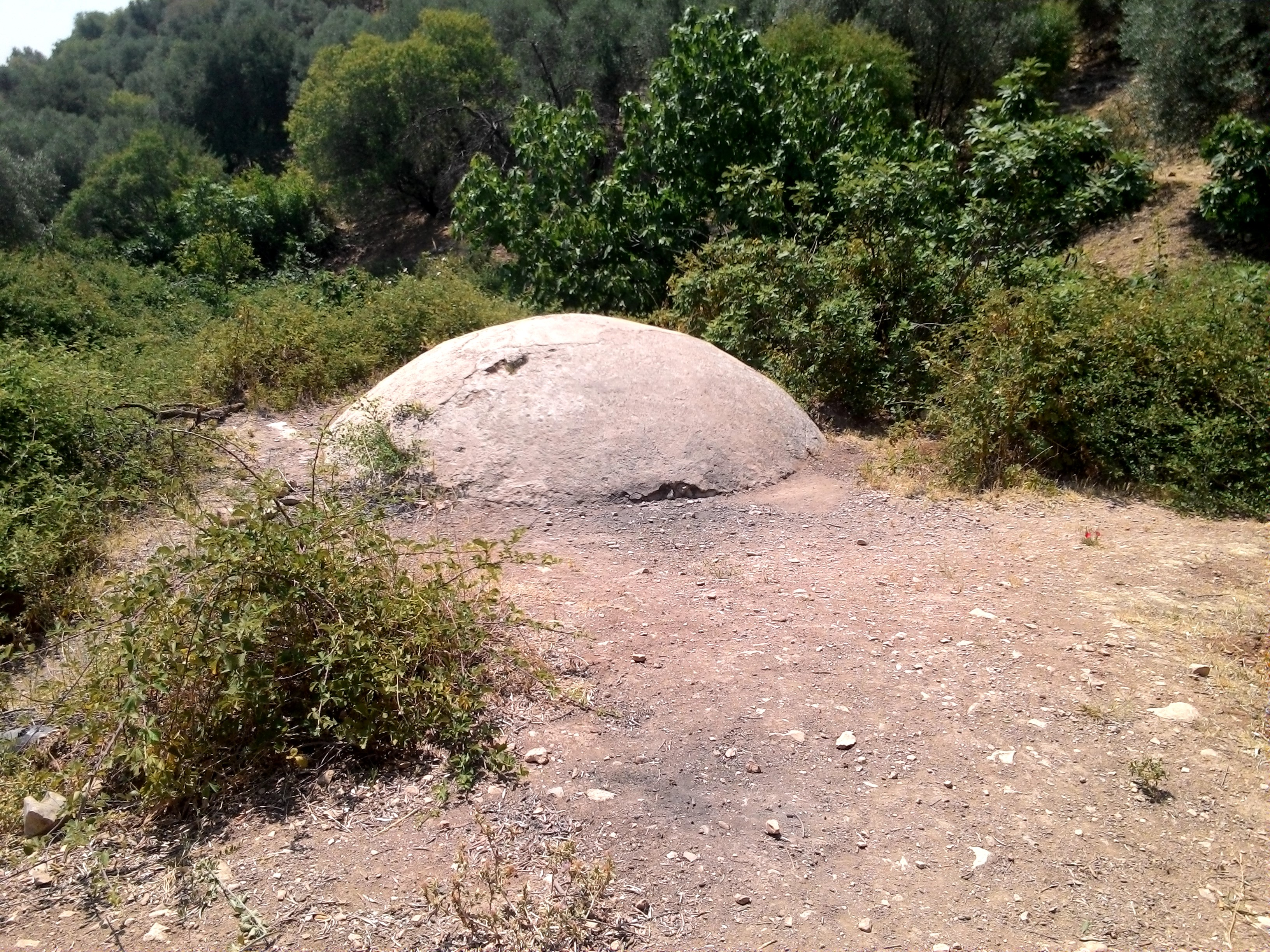 מעין כדן-צילם מתן ממן